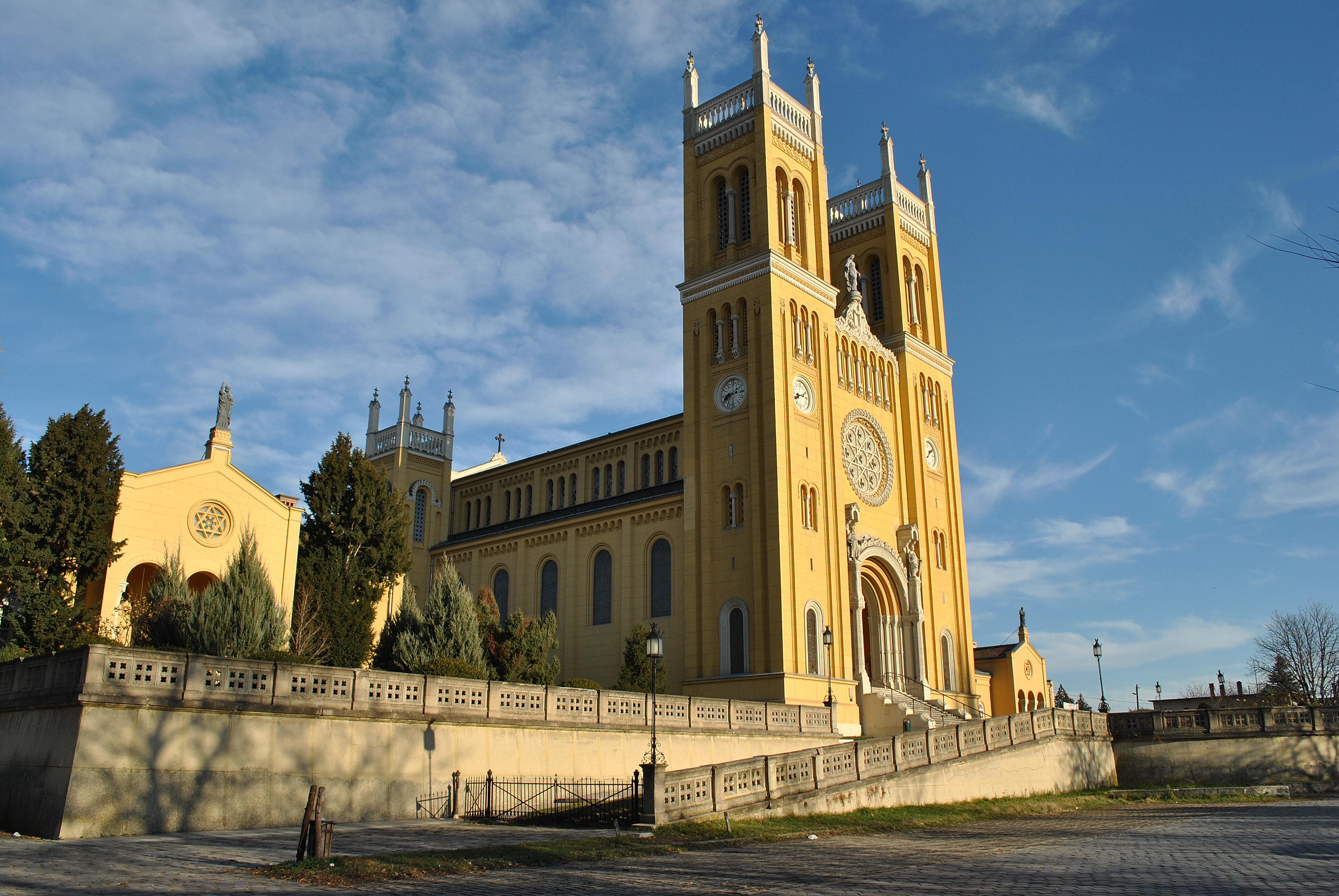 Római katolikus templom (Fót, Vörösmarty u.)